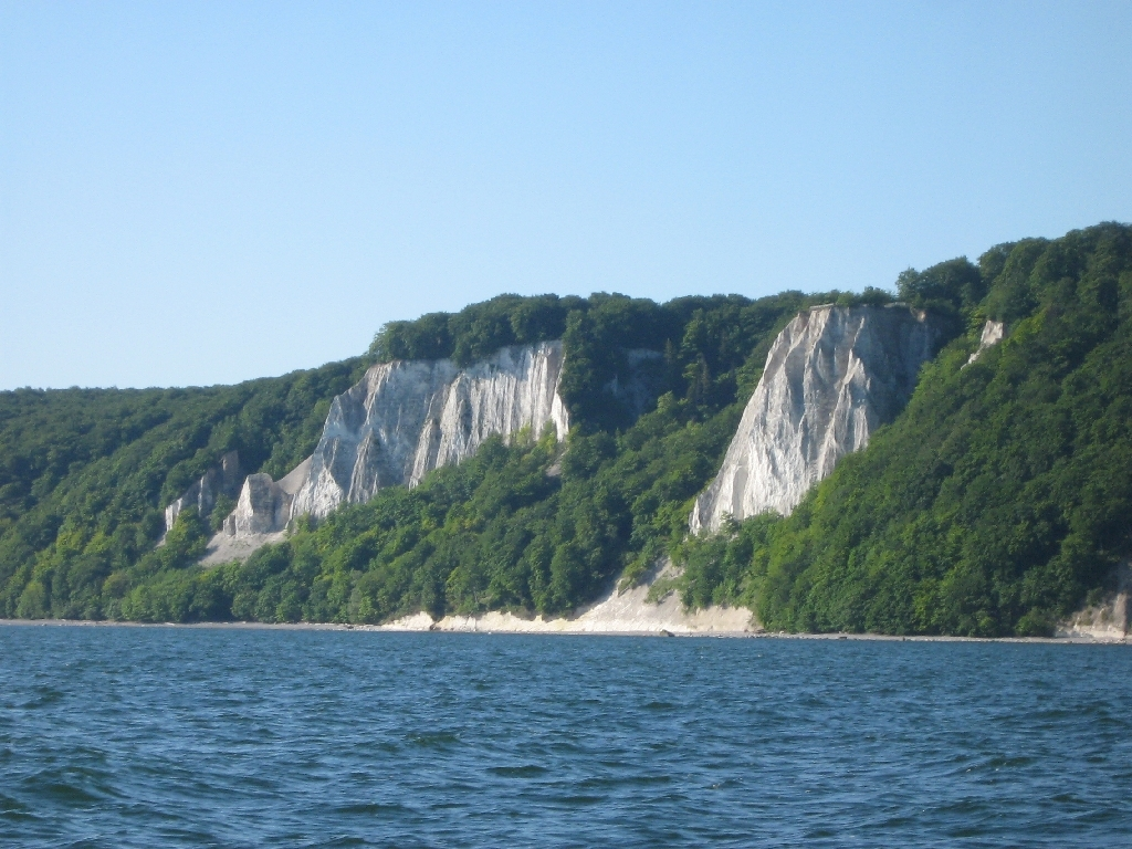 Stubbenkammer von der Ostsee aus gesehen